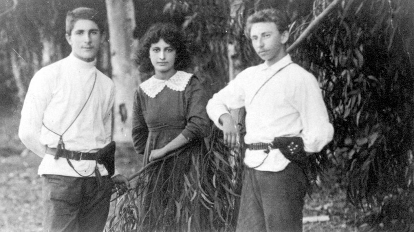 1913 פועלים במושבה כנרת מימין: זילברשטיין, שרה לייקין ונחמקין 1913 - מושבה כנרת/מוזיאון